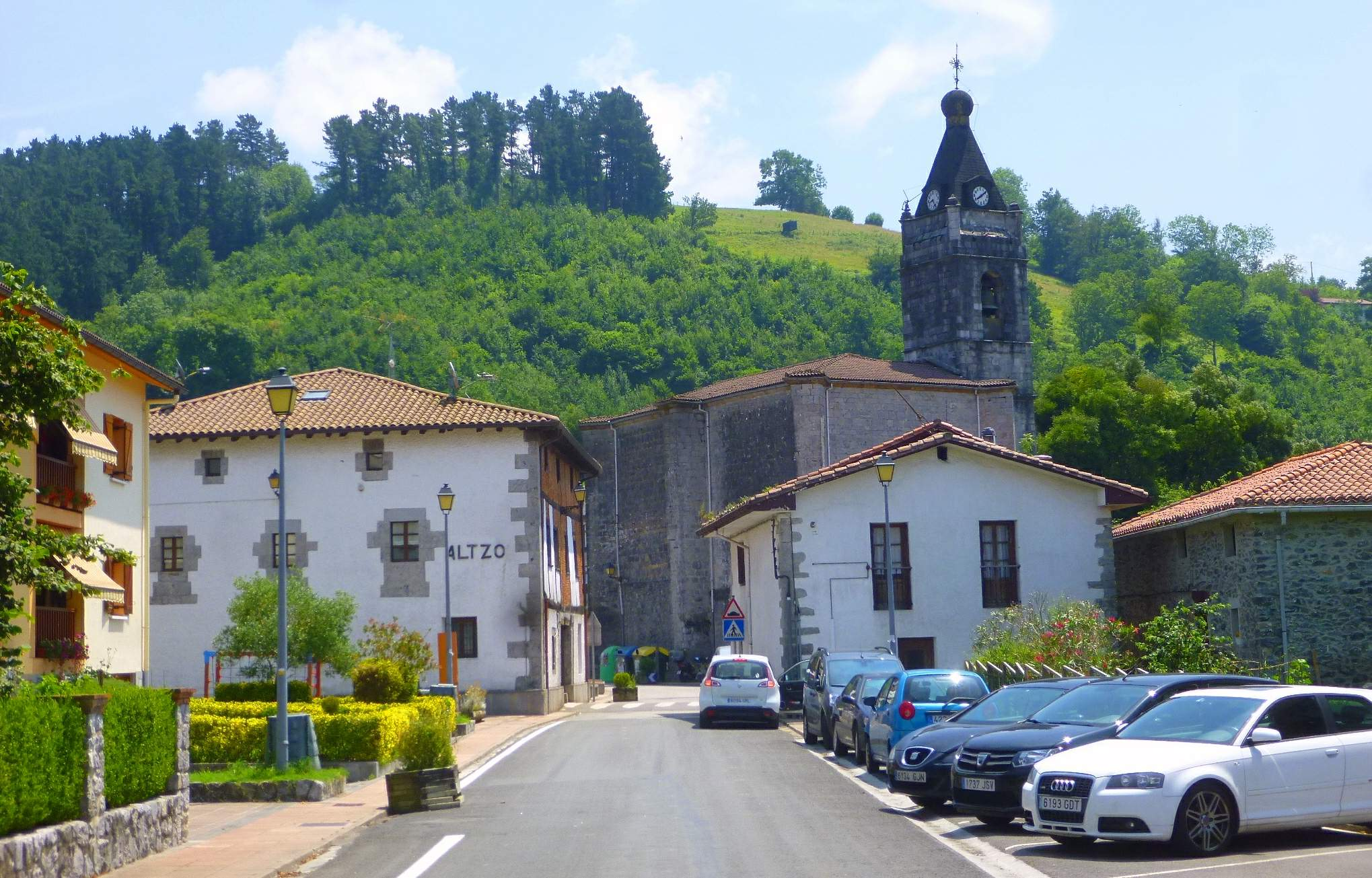 Altzo (Guipúzcoa)